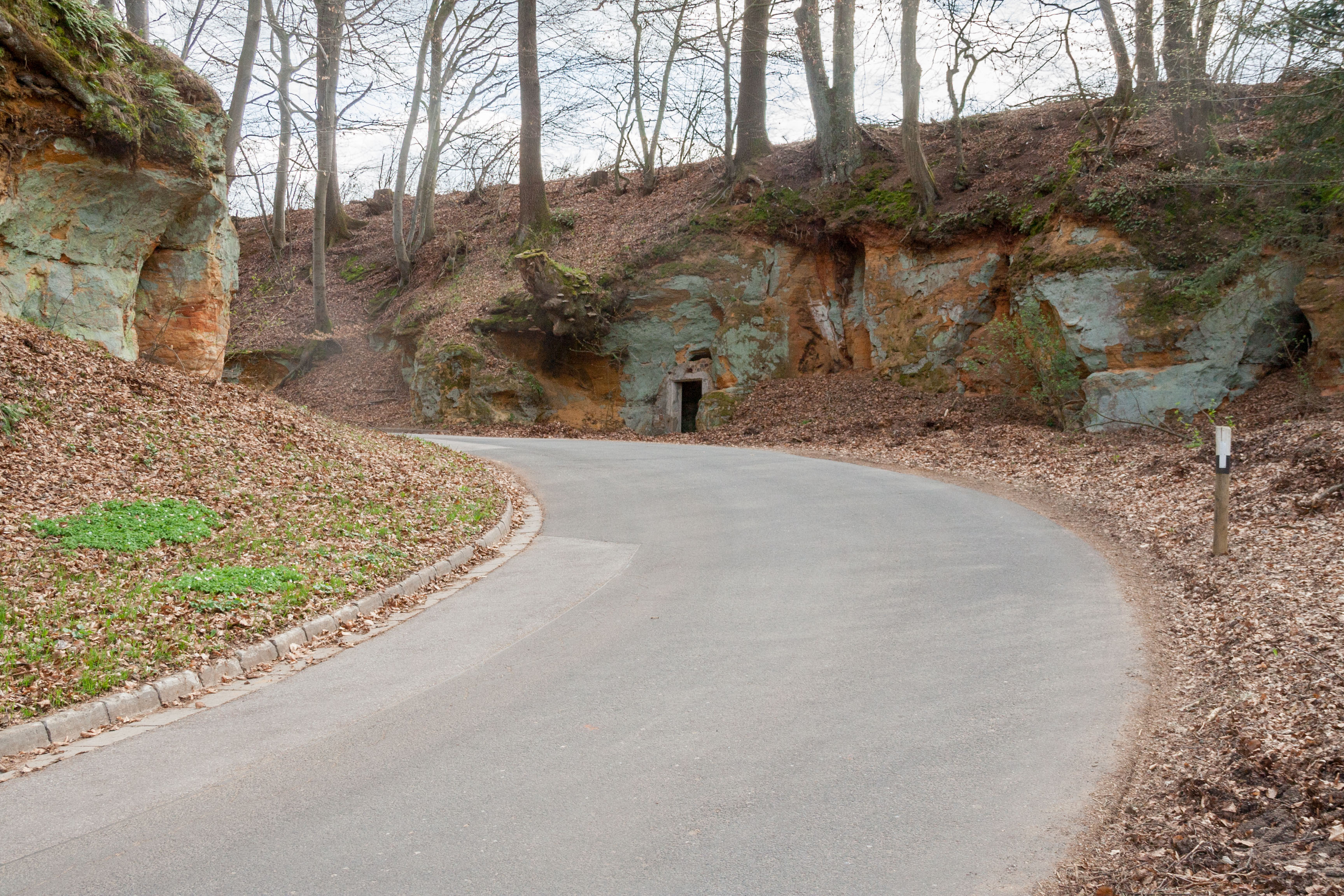 Geotop, Hohlweg bei Gspannberg, Berg bei Neumarkt in der Oberpfalz